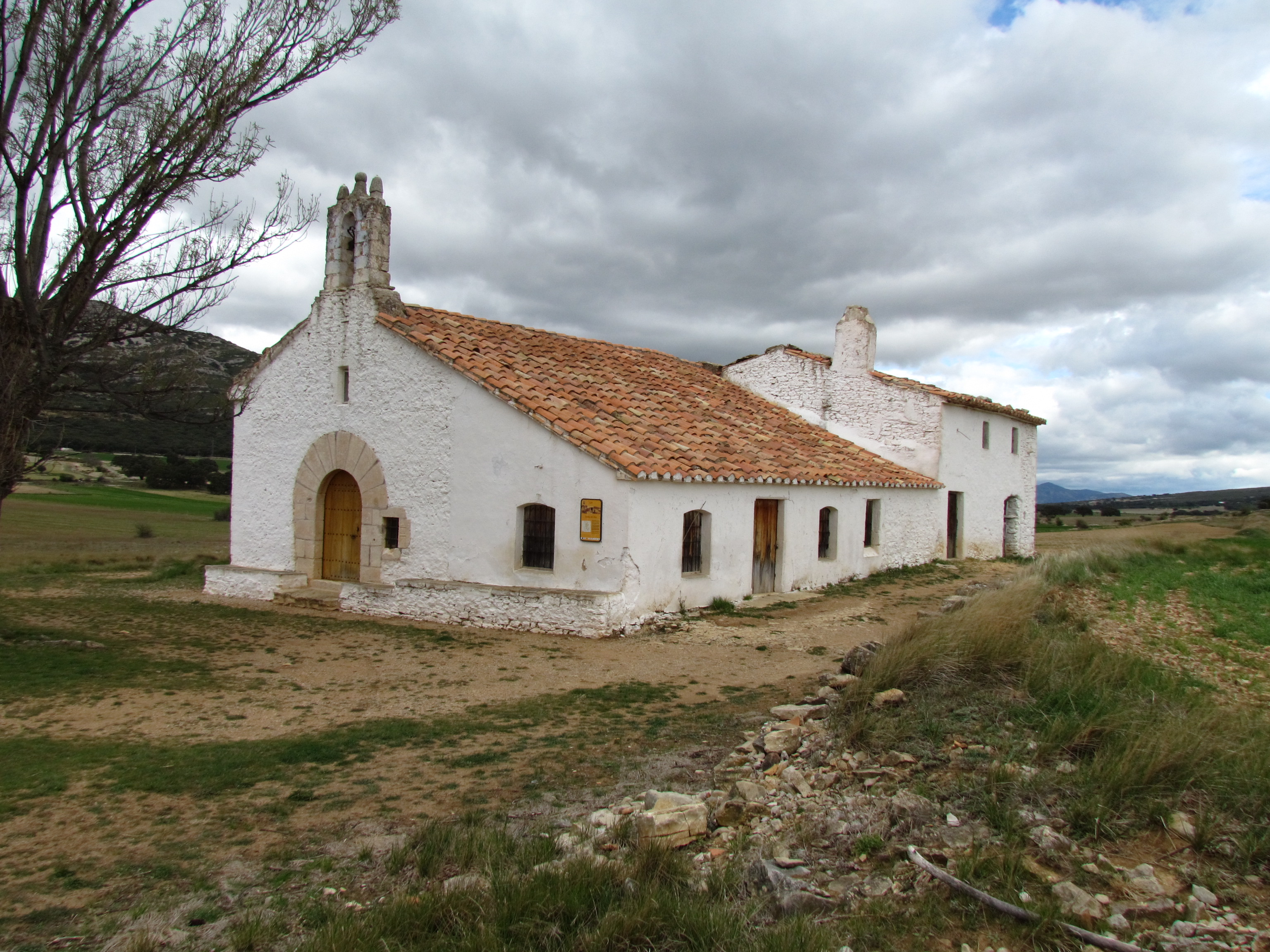 Vista general de l'ermita de la Mare de Déu del Pilar de Catí, Alt Maestrat